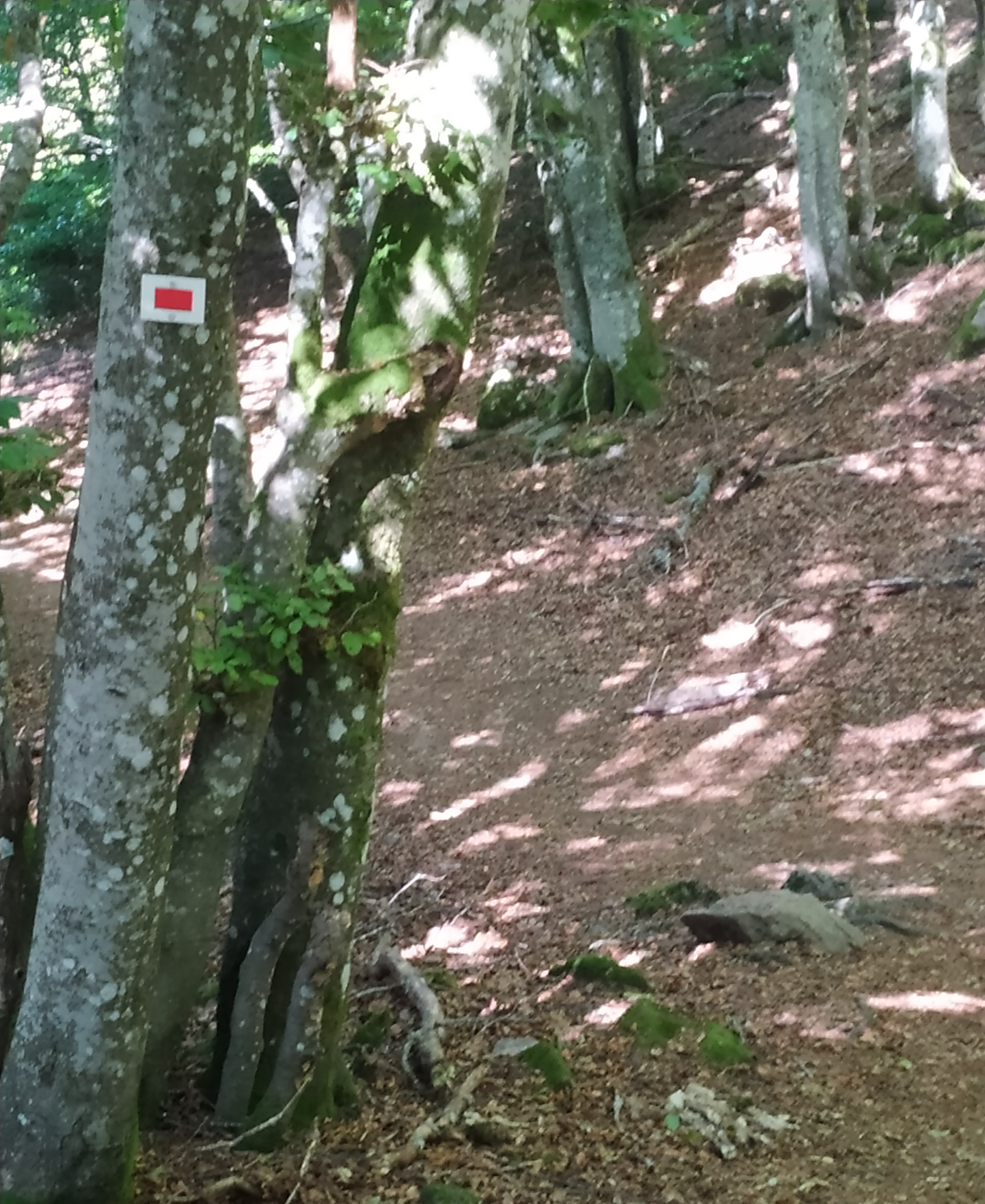 GR5 près du Ballon d'Alsace (versant alsacien).